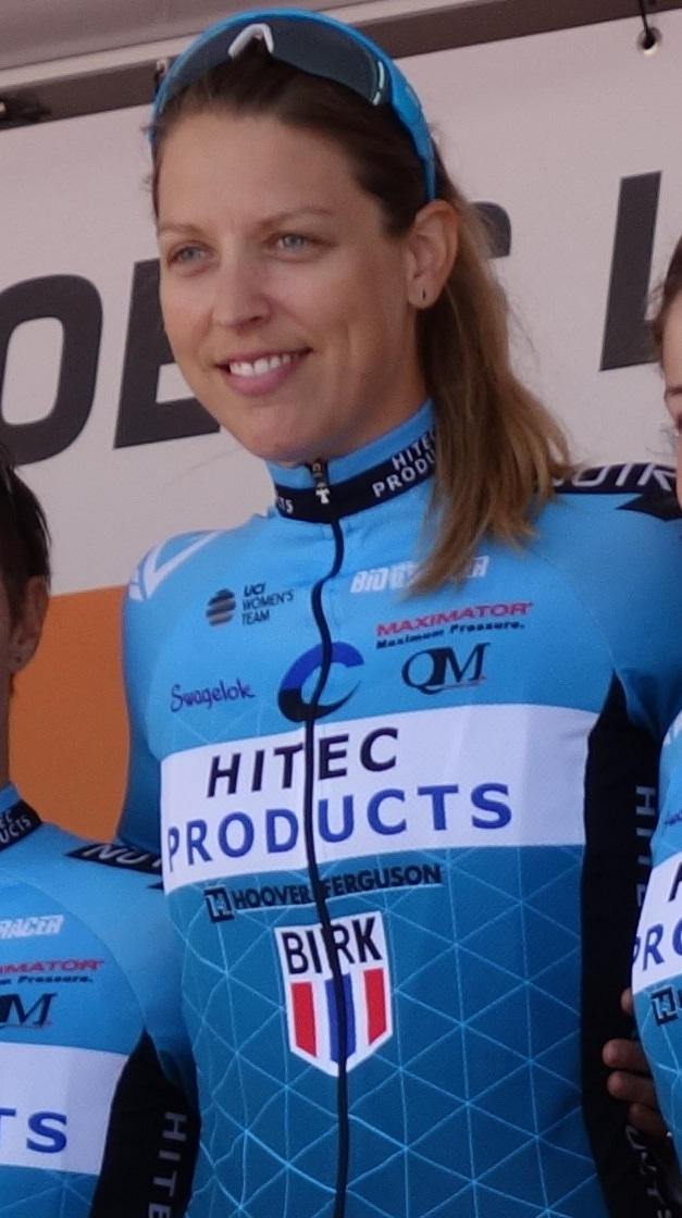 Julie Solvang (Hitec) bij de start van de eerste etappe van Stramproy naar Weert in de Boels Ladies Tour 2019